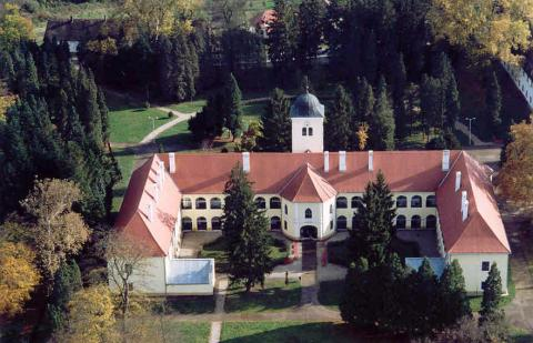 Csákánzdoroszló - palace, Hunagry, aerialphotography